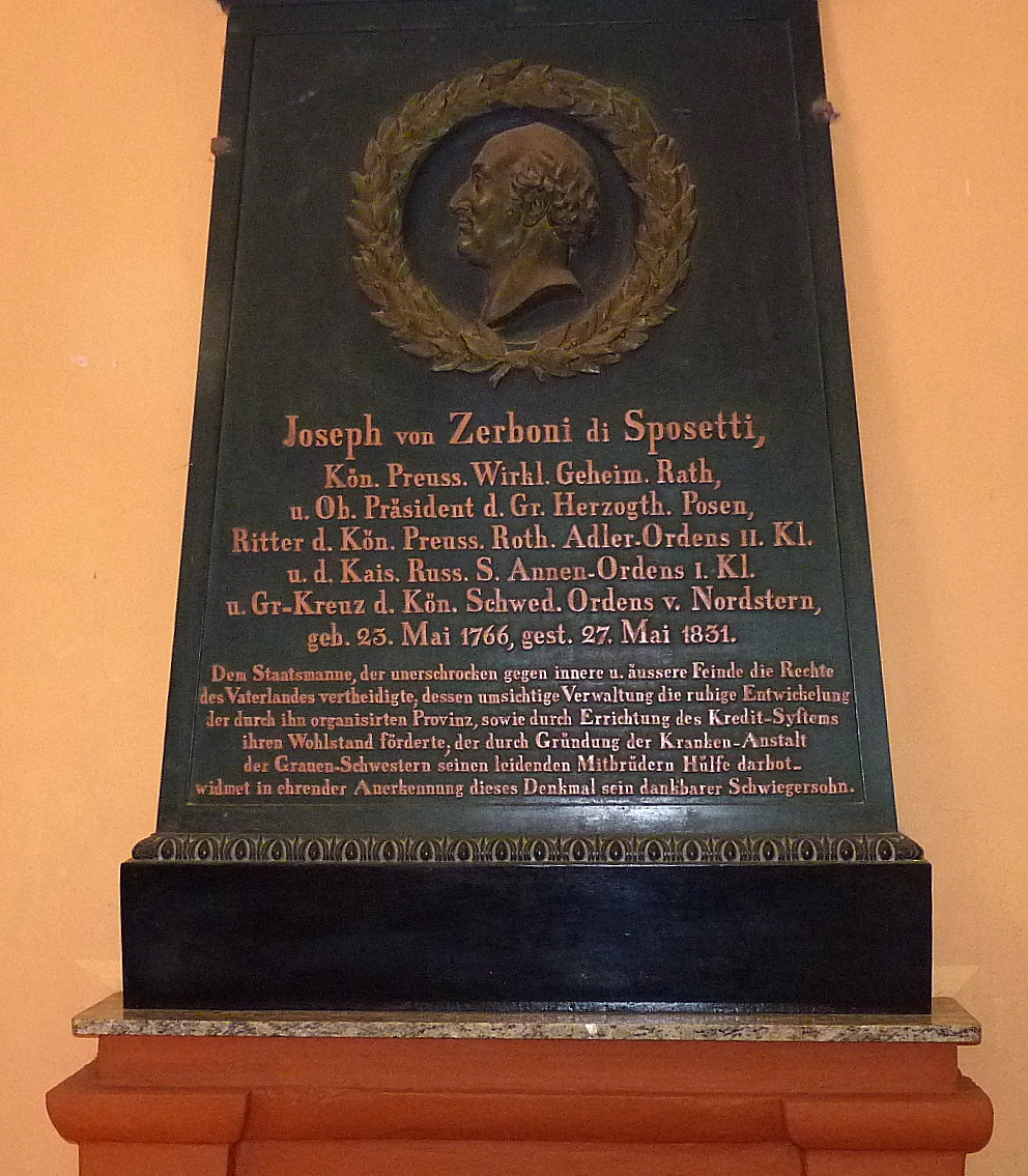 Łekno, ul. Poprzeczna - rzymskokatolicki kościół parafialny pw. św. Piotra i Pawła z XV w.